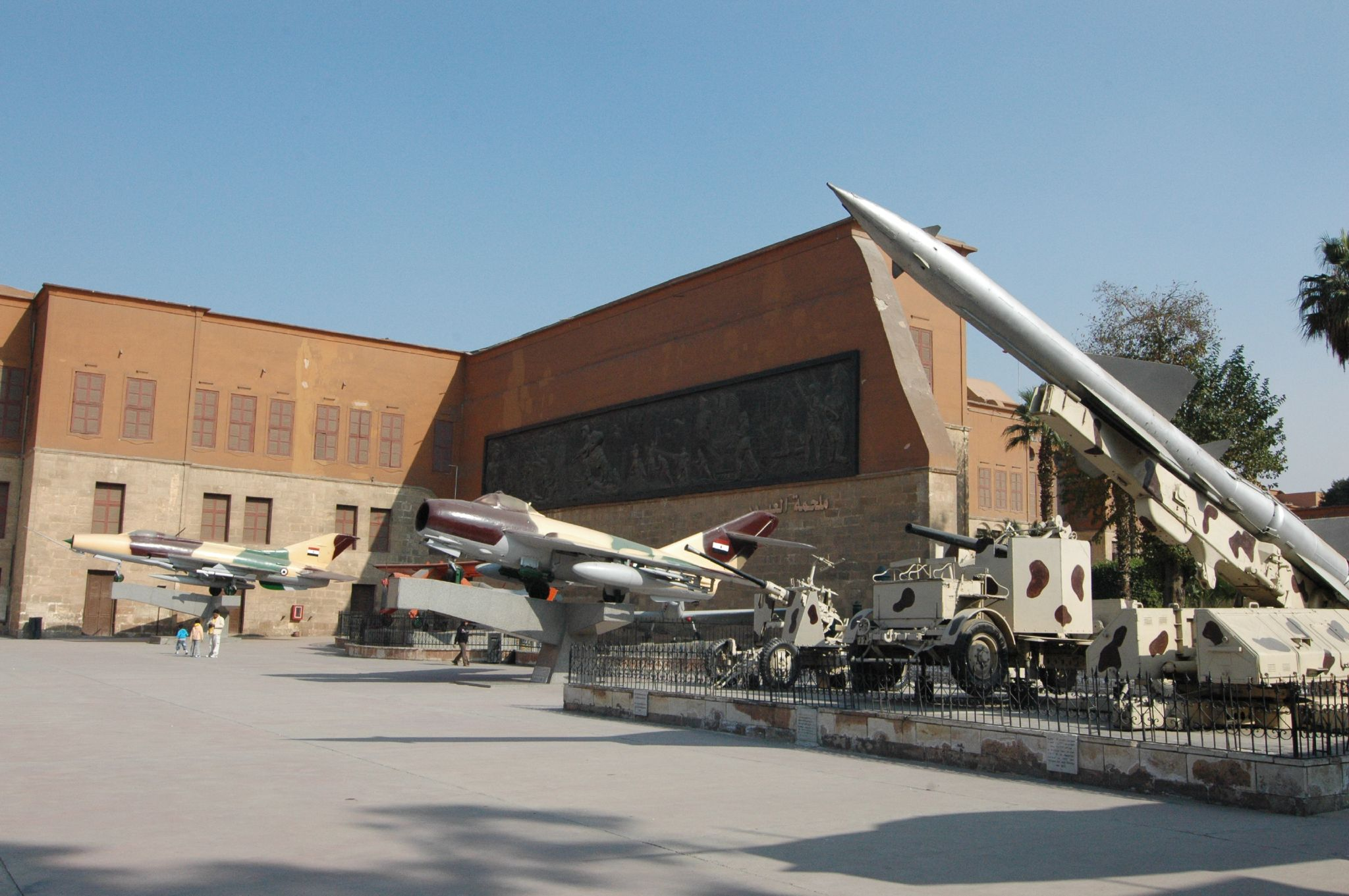 Cairo: museo militare